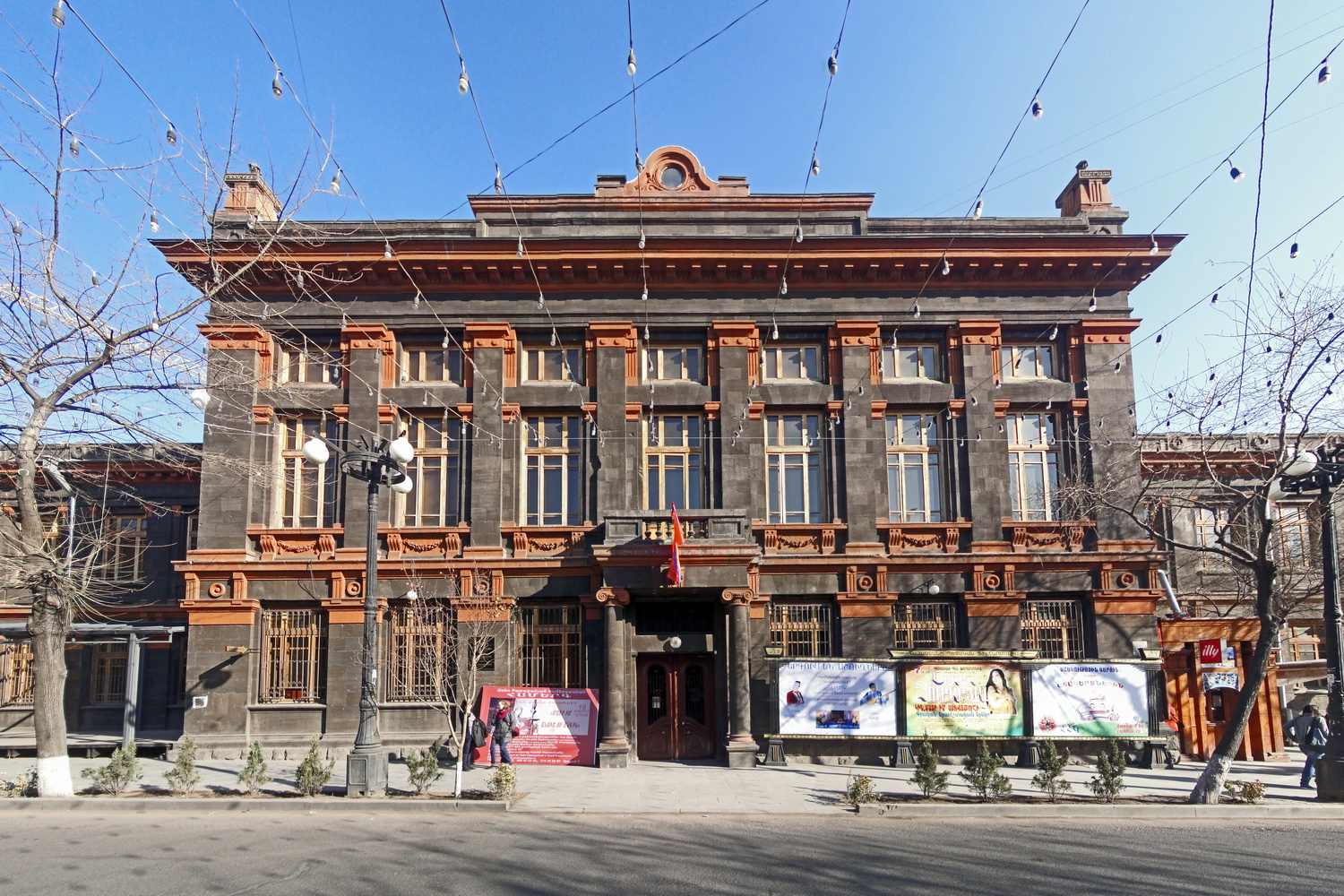 Yerevan, Abovyan st. 2, Arakan gimnazia, 1916